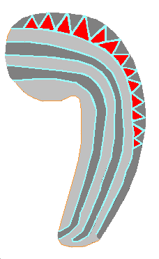 Baculo farblich angelegt